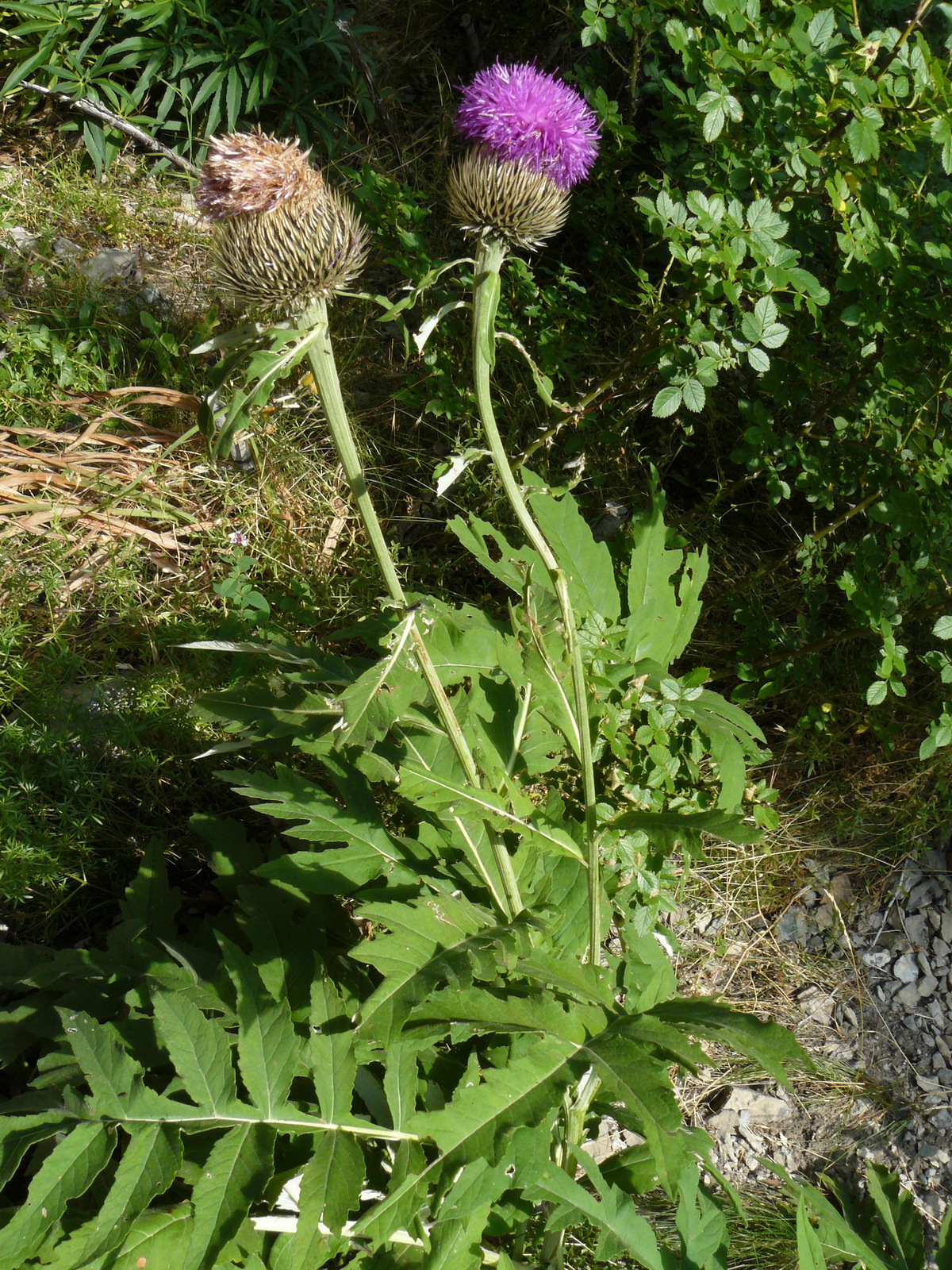 Rhaponticum centauroides, donde se aprecia la roseta de grandes hojas lobuladas y dentadas; los tallos con hojas más o menos enteras y los capítulos solitarios al final de cada tallo engrosado junto a éstos.